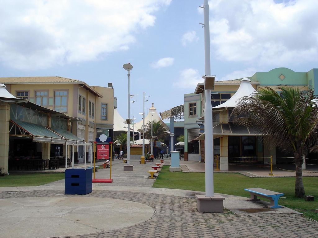 Aeroclube